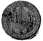 Siegel der Hansestadt Lübeck